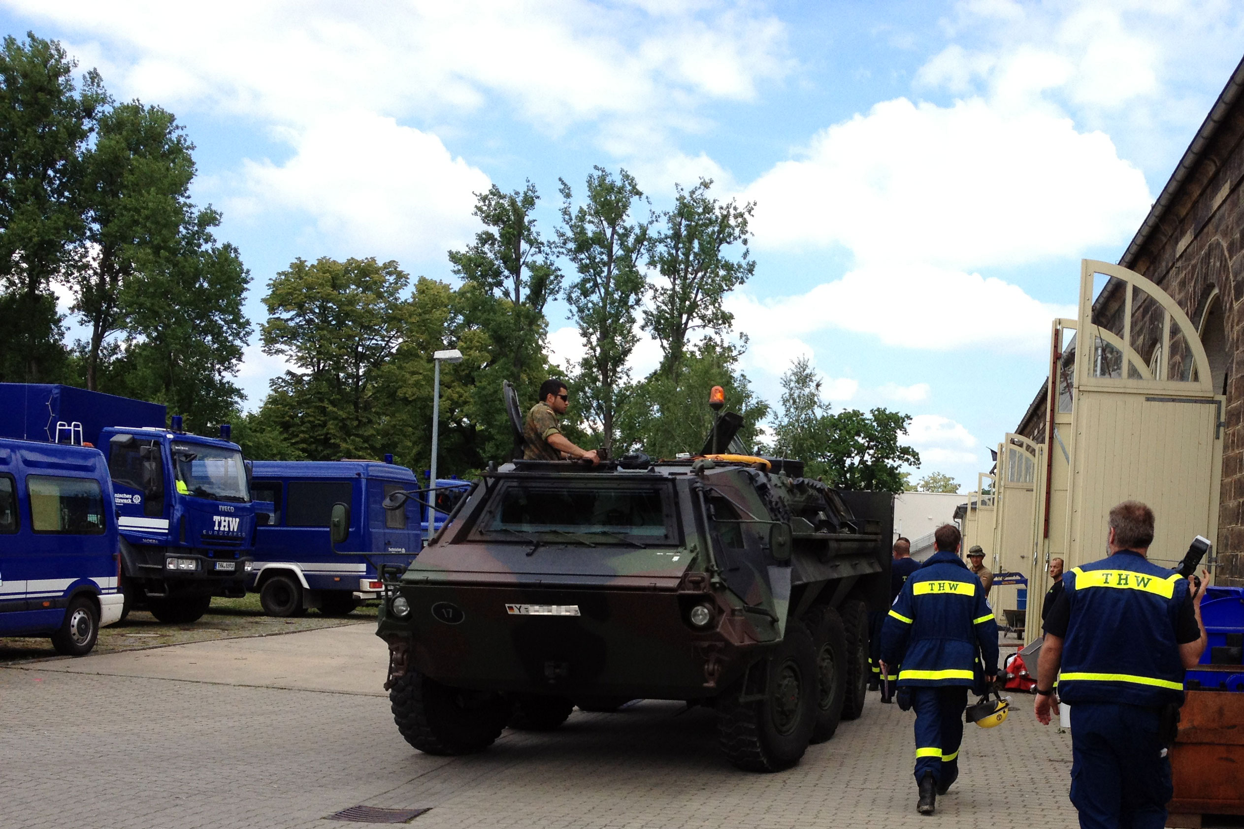 THW und Bundeswehr im Bereitstellungsraum Dresden (Hochwasser Sachsen Juni 2013)